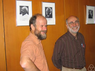 Foto di Dugald Macpherson (sinistra) e Cohen, Arjeh M. (destra)